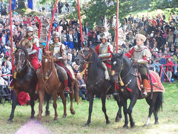 turniej , konie